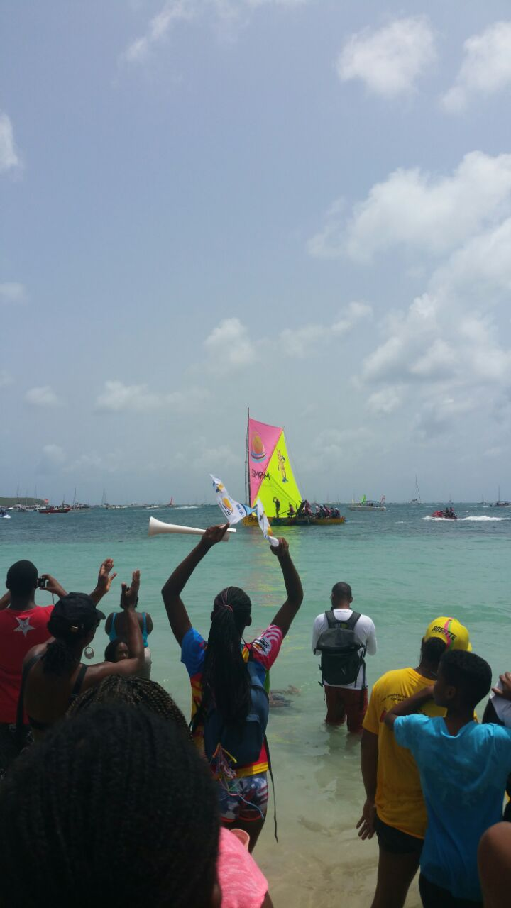 Yole ronde de la Martinique